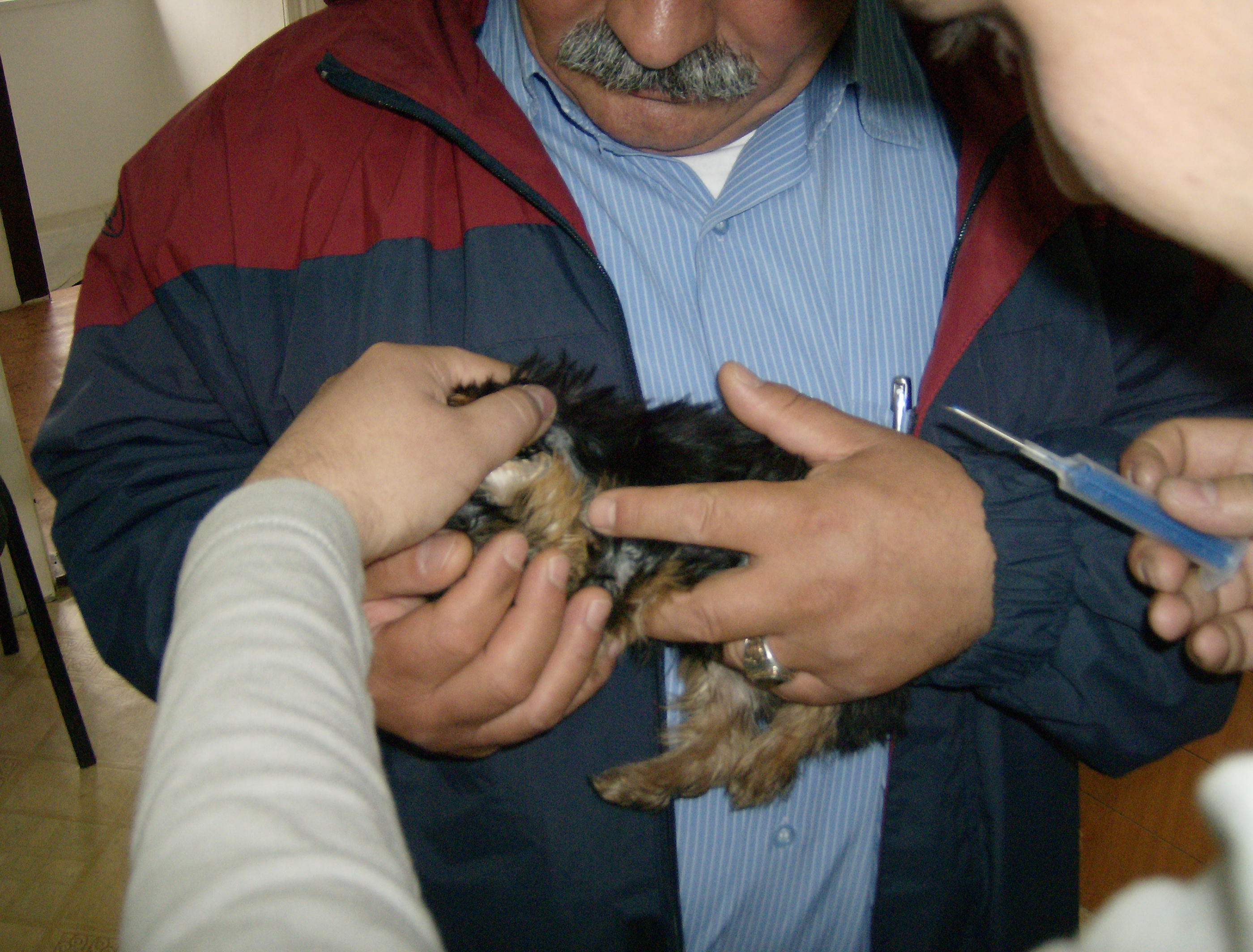 Поставяне на микрочип при куче